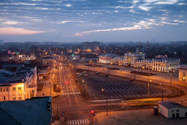 Рыбинск. Привокзальная площадь